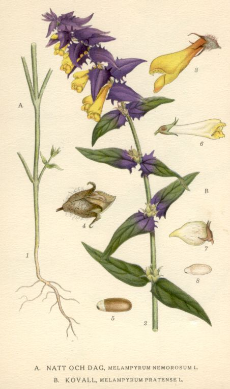 Melampyrum nemorosum